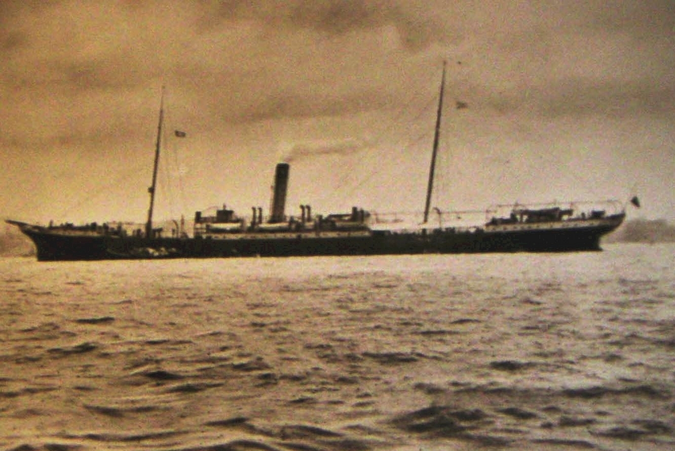 Пароход "Тамбов" на рейде в Джибути. Экспедиционное фото, 1913 г.